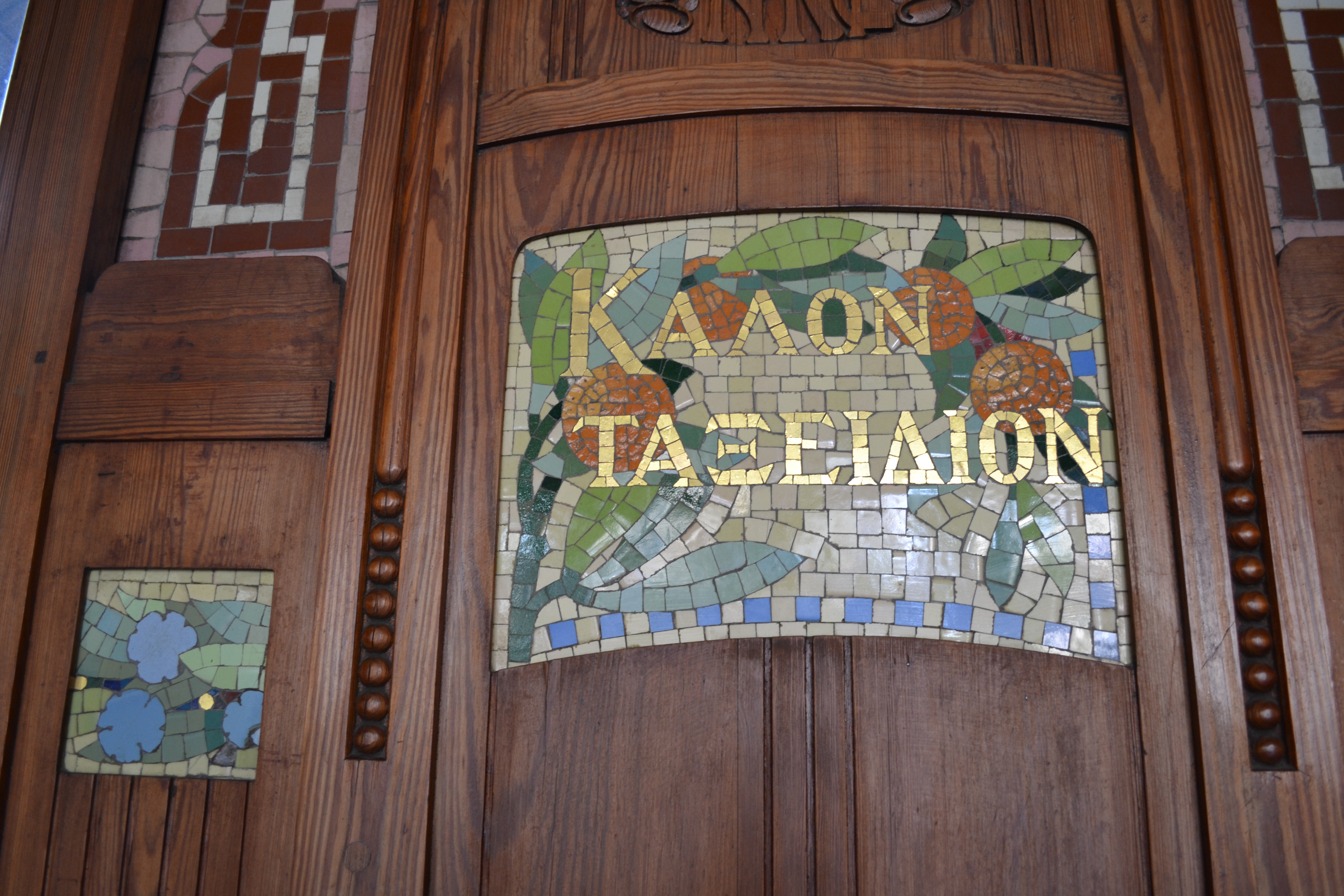 Buen Viaje en griego (ΚΑΛΟΝ ΤΑΞΕΙΔΙΟΝ). Decoración modernista a base de trencadís. Interior de la Estación del Norte de Valencia.